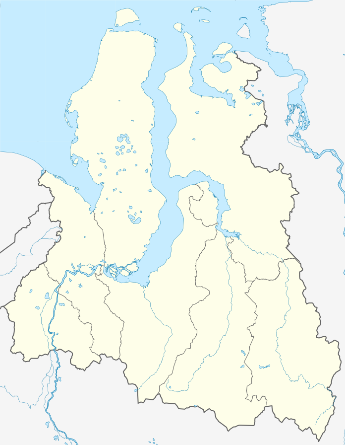 Административная карта Ямало-Ненецкого автономного округа, Россия. Координаты границ: E 61.8 86.3, N 62.1 73.7 Координаты углов GMT: -R61.8/86.3/62.1/73.7 Инструменты: JOSM, QGIS, GMT, Inkscape This map may be incomplete, and may contain errors. Don't rely solely on it for navigation.